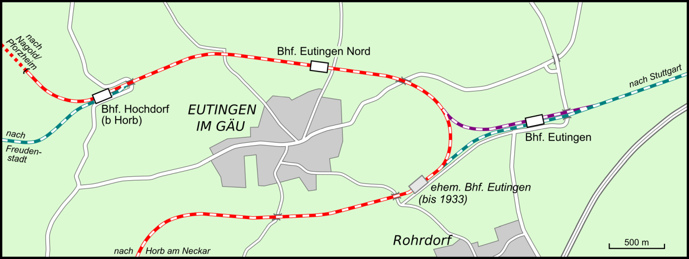 Bahnlinienkreuz bei Eutingen im Gäu